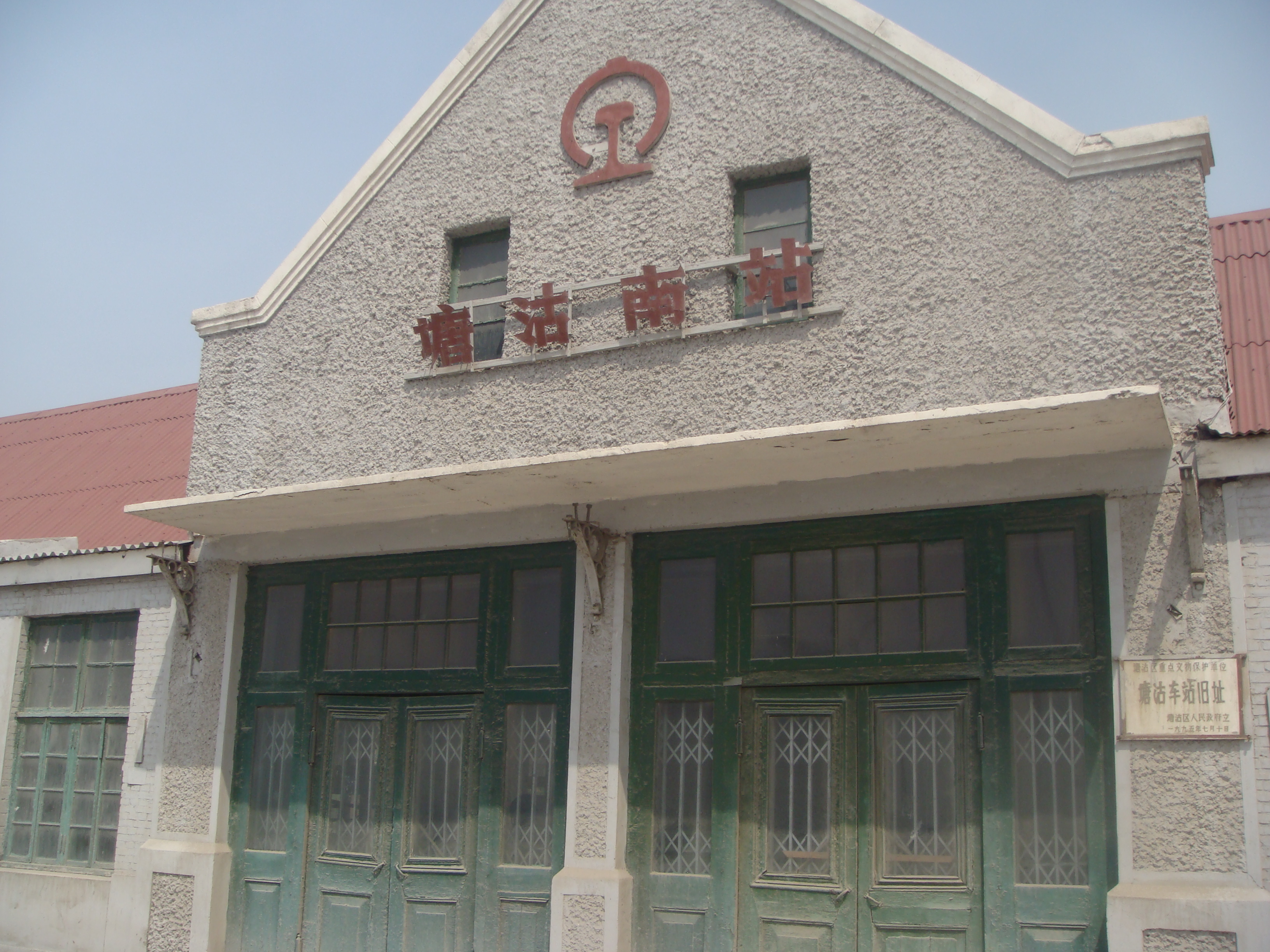 塘沽南站站外